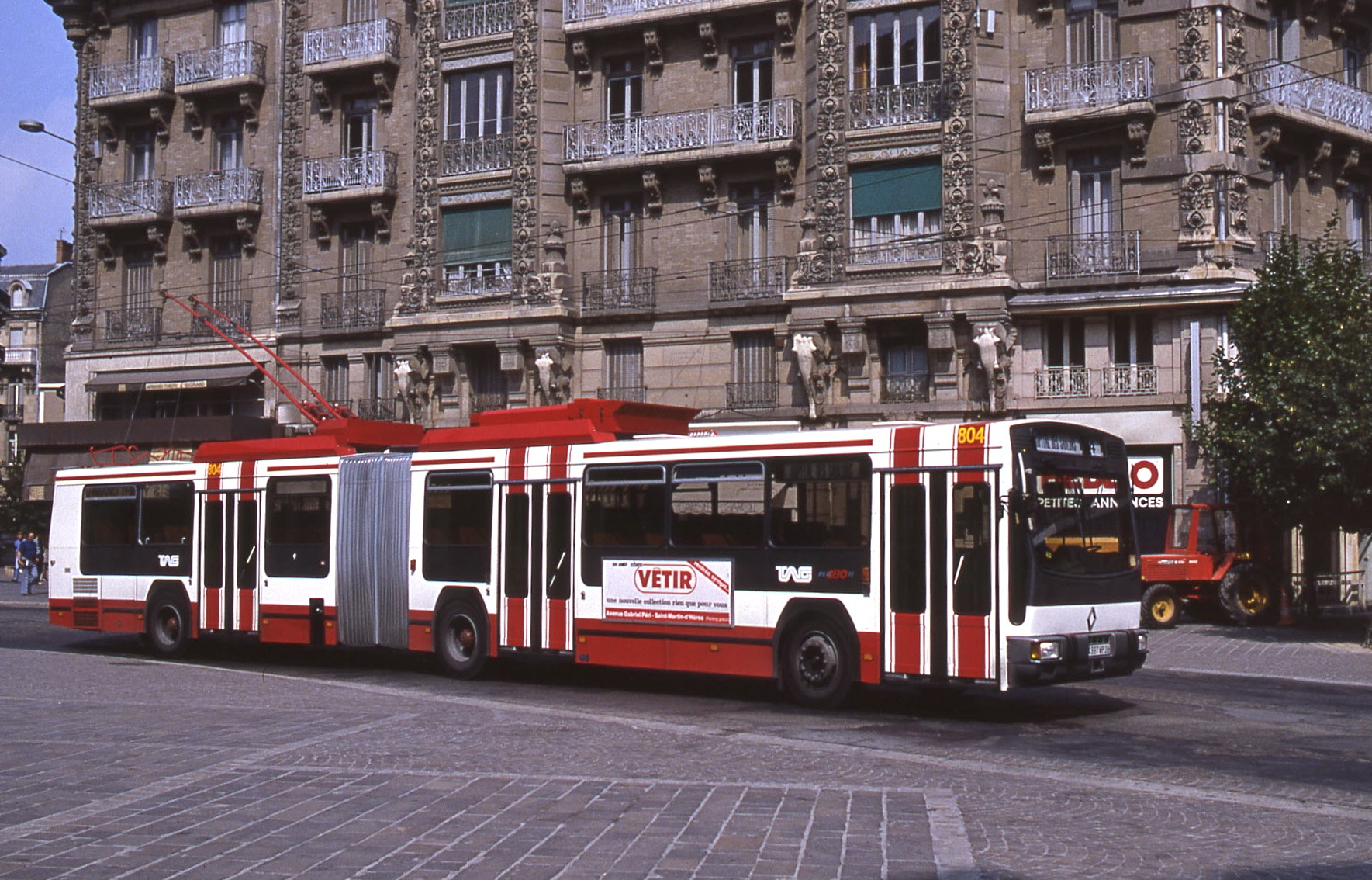 Un Renault PER180H rue Felix Poulat à Grenoble, circulant sur la ligne 4.